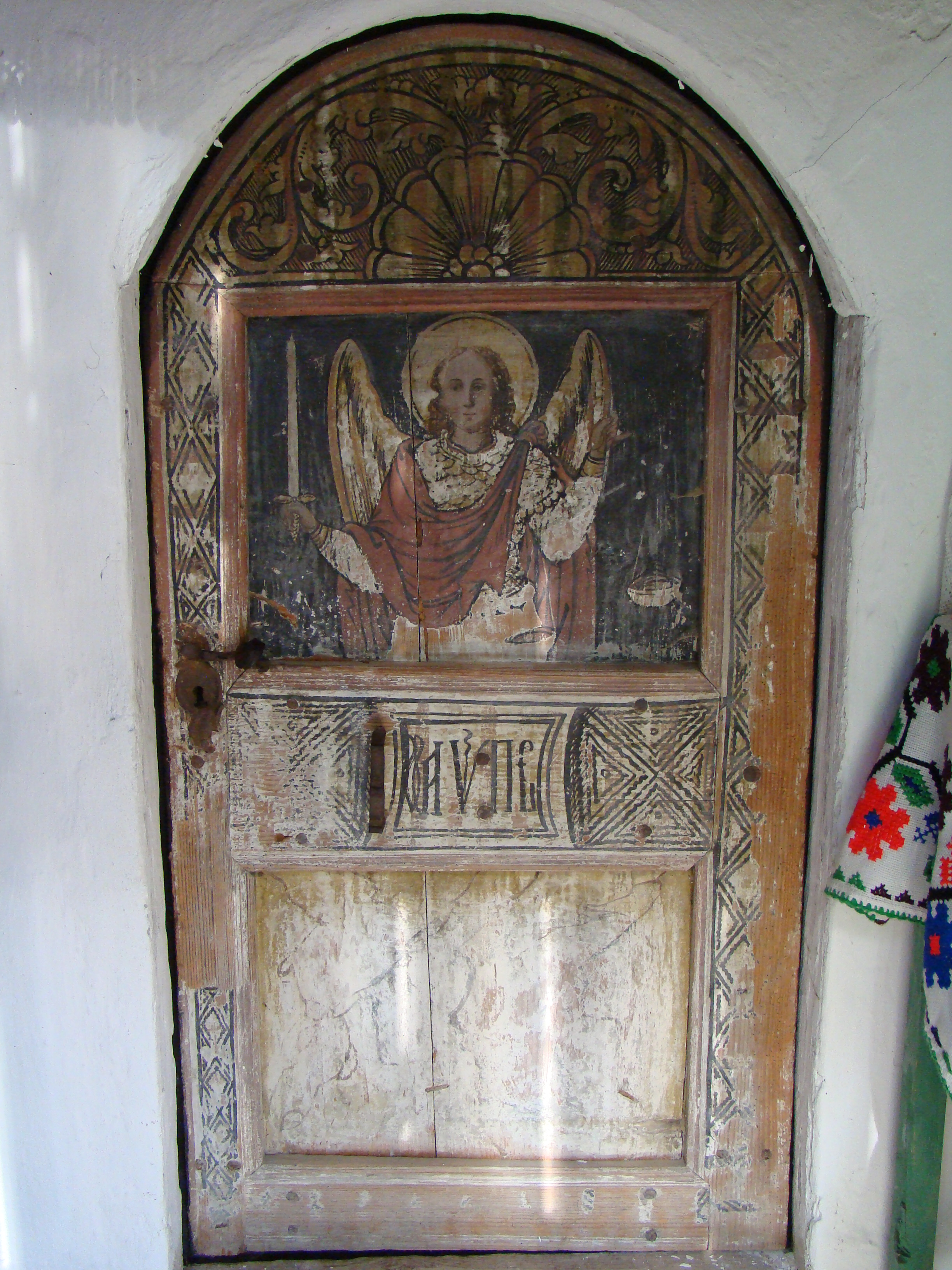 Biserica de lemn din Valea Largă-Alba